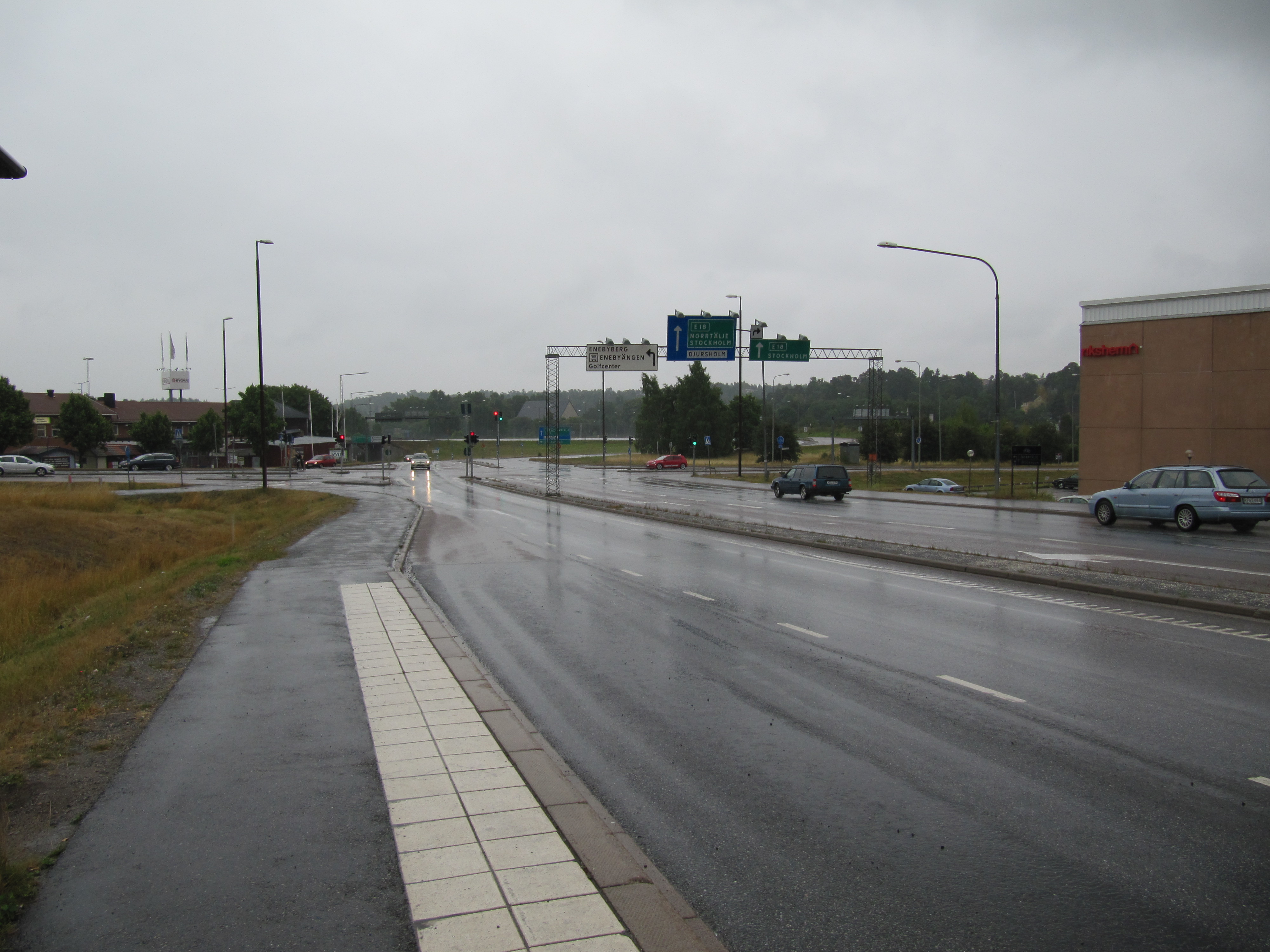 Slutet av länsväg 262 i Danderyd. Vy mot sydost och mot Danderyds kyrka.